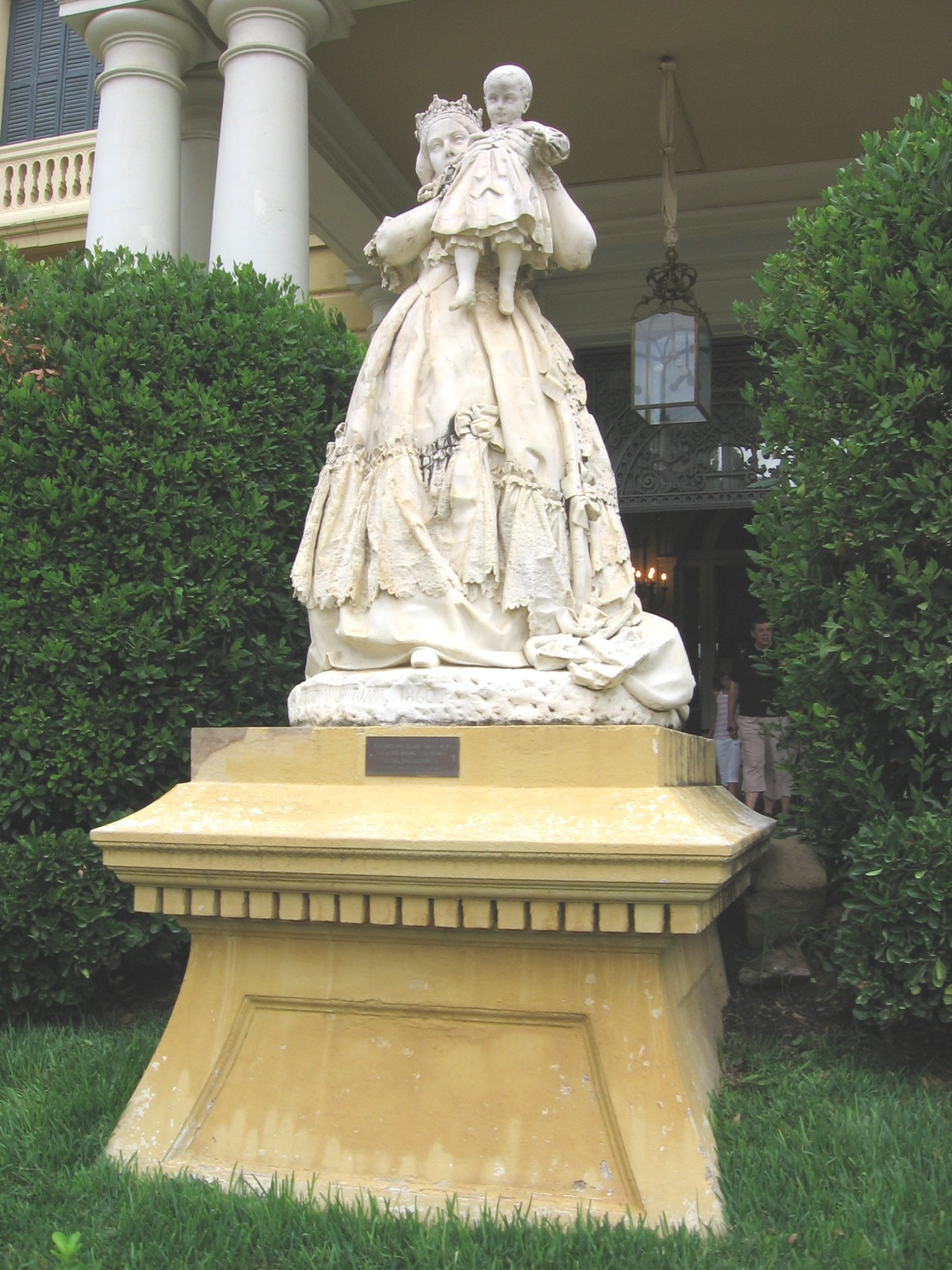 Isabel II mostrando a su hijo Alfonso XII, de Agapit Vallmitjana, en el Palacio Real de Pedralbes (Barcelona)